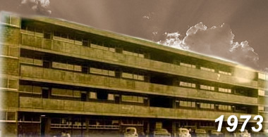 UN 1973